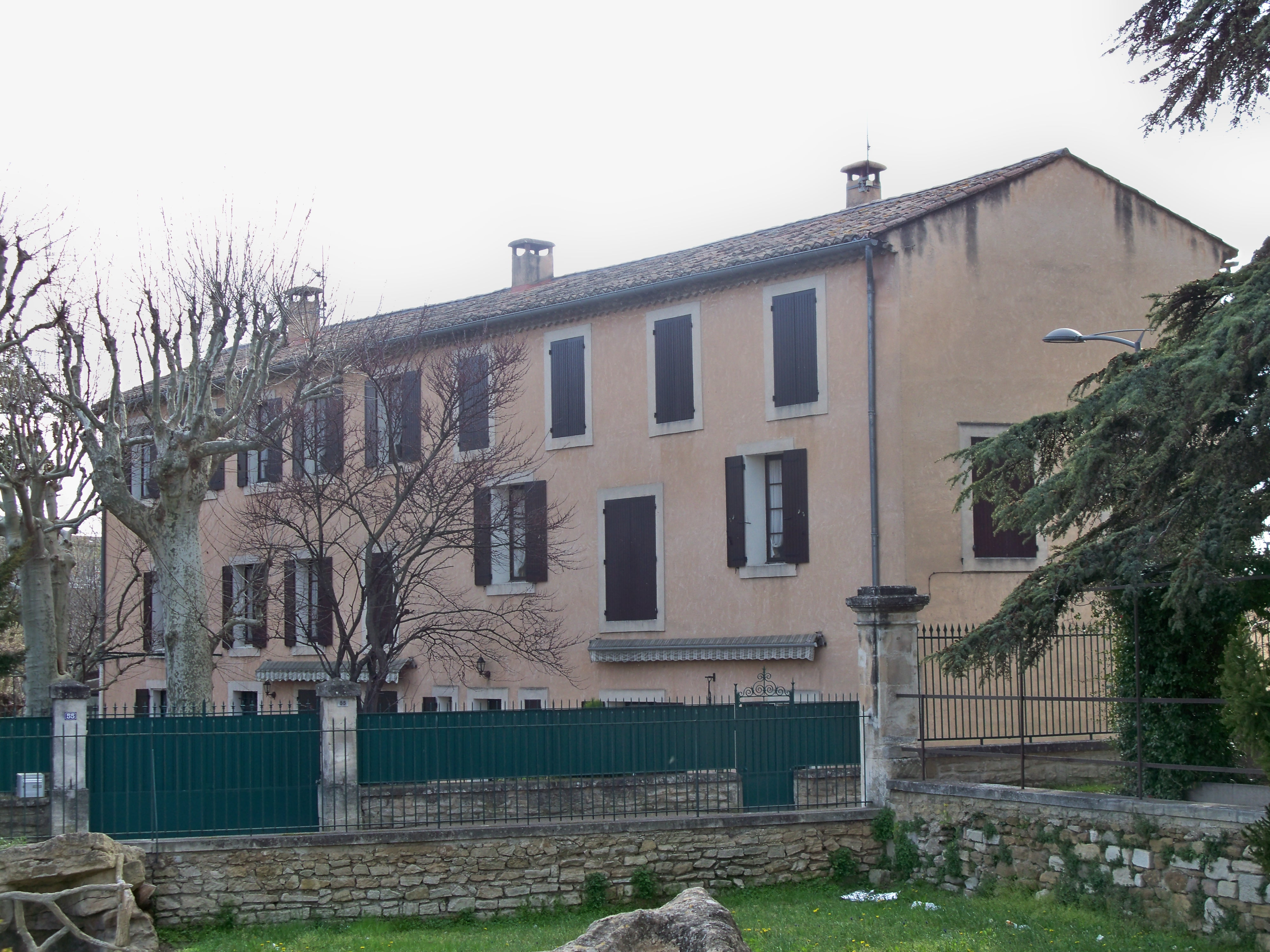 Ancien lazaret La Malautière, à Carpentras (84)